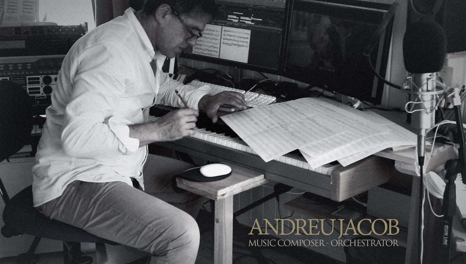 Andreu Jacob trabajando en la banda sonora para la película "El guión verdadero" Moscú © 2018